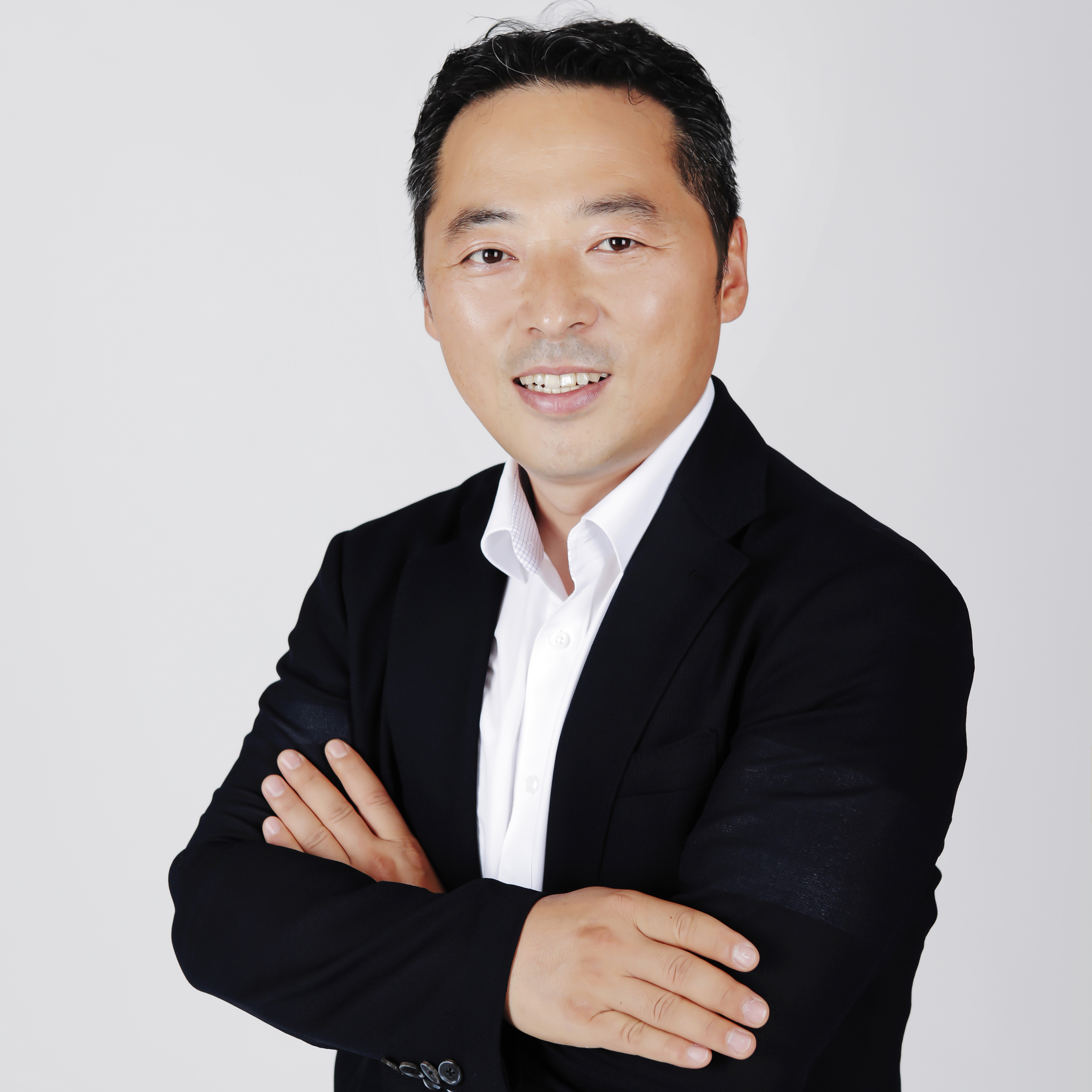 안응준 건축사